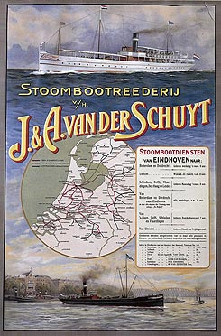 Poster met dienstregeling van rederij J.A. van der Schuyt